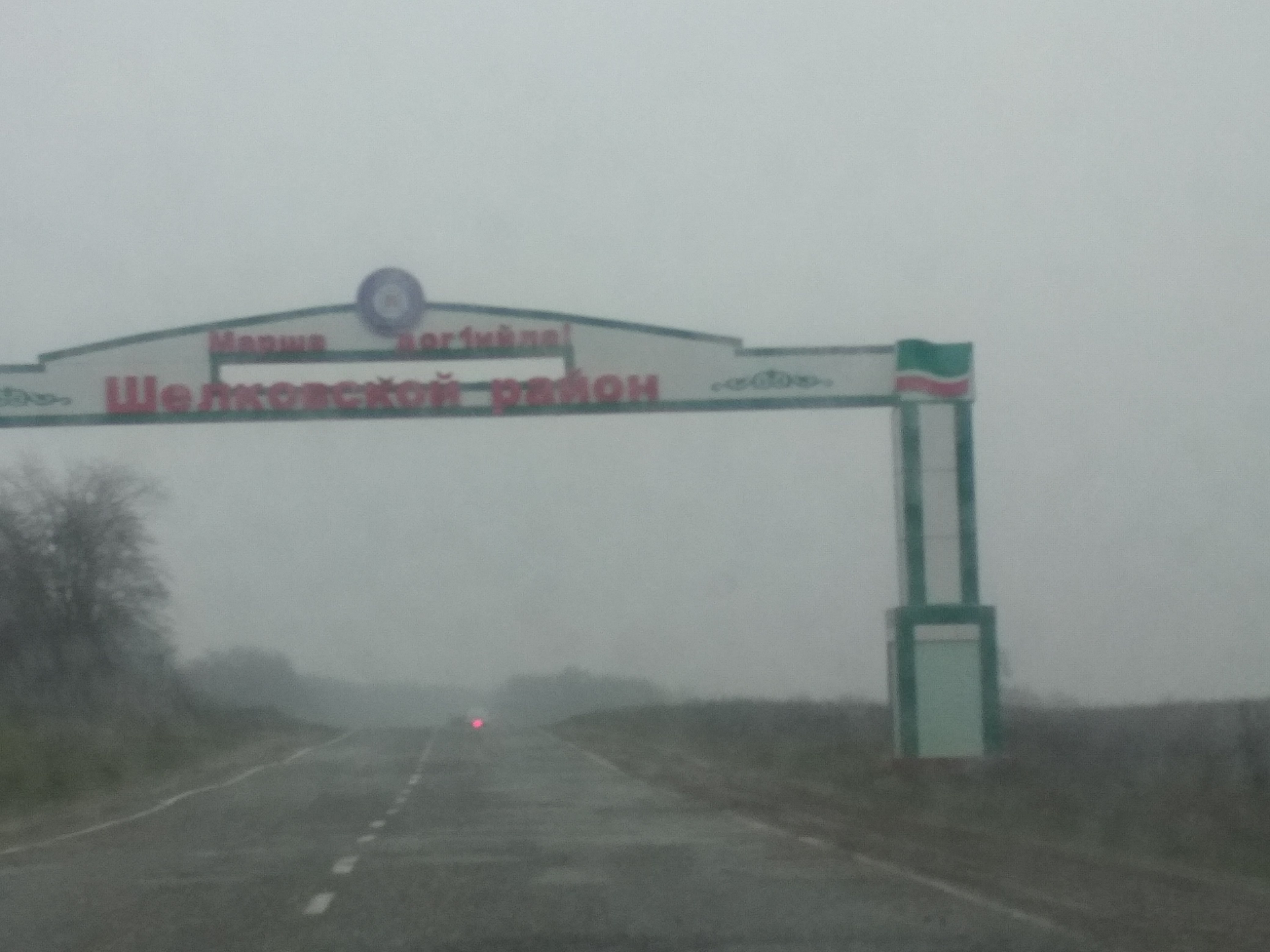 Нохчийн: Въезд в Шелковской район